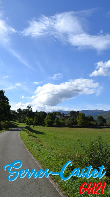 Image montrant un géofilter